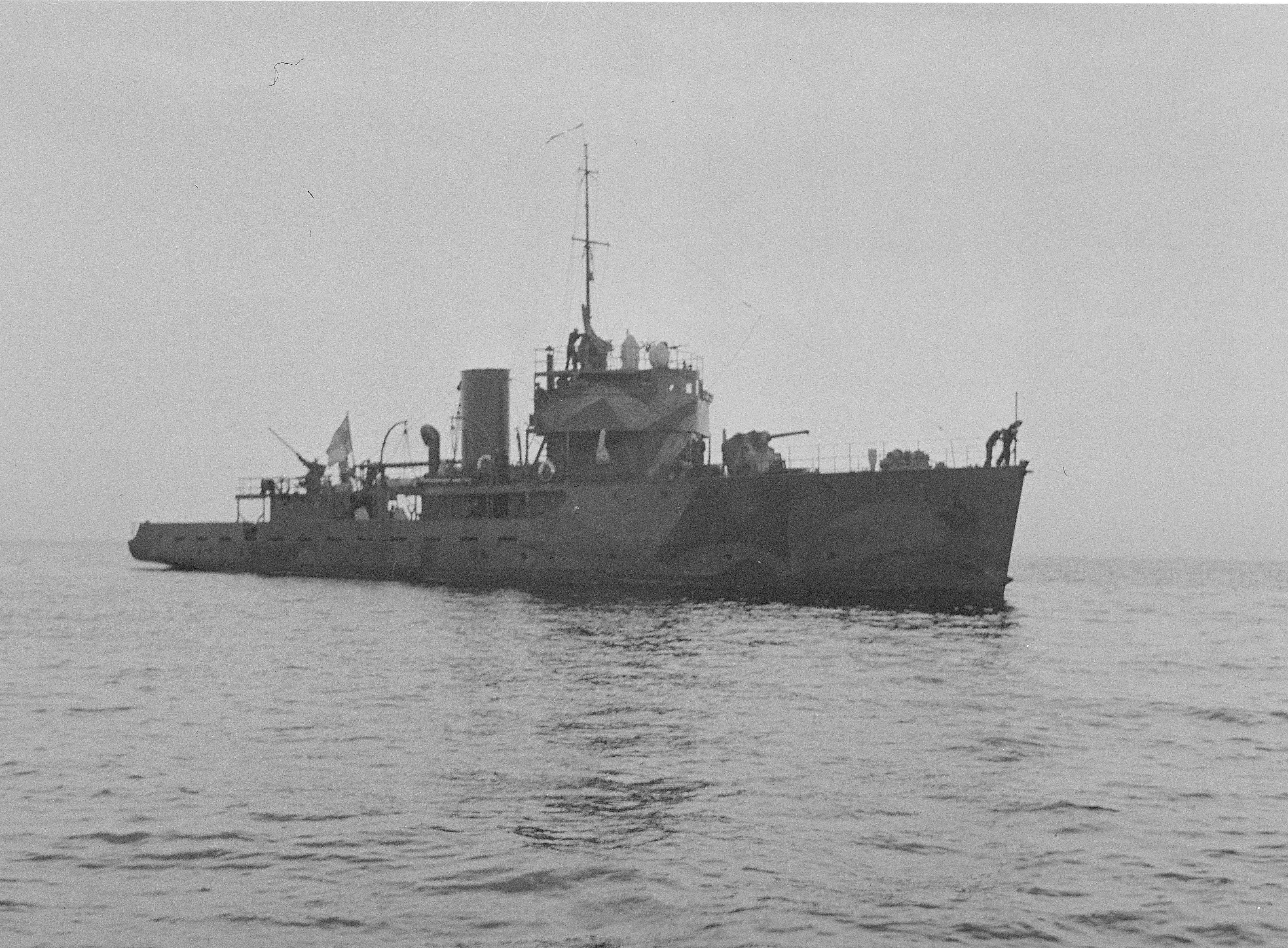 Ruotsinsalmi on laskenut ankkurin taistelumääräyksiä odotellessa.